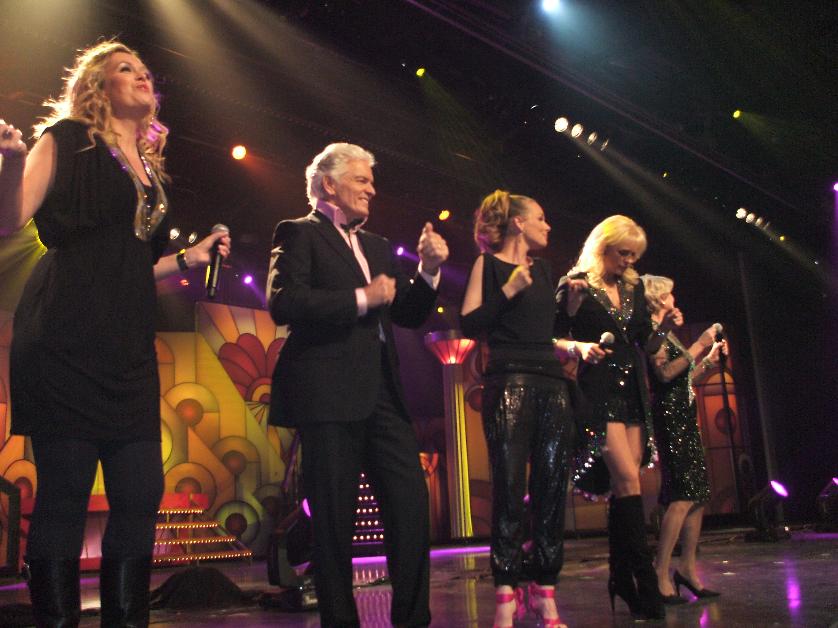 Pauzenummer tijdens het Nationaal Songfestival 2011 Esther Hart, Ben Cramer, Marlayne, Marga Bult & Anneke Grönloh